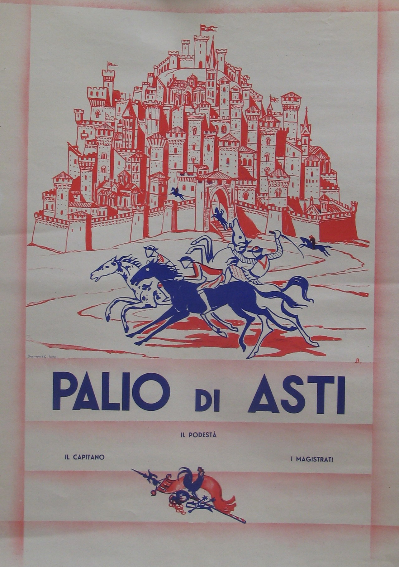 Palio di Asti, Manifesto degli anni 20 per la Corsa e per le Festività di San Secondo. Foto fatta da me Faberh.